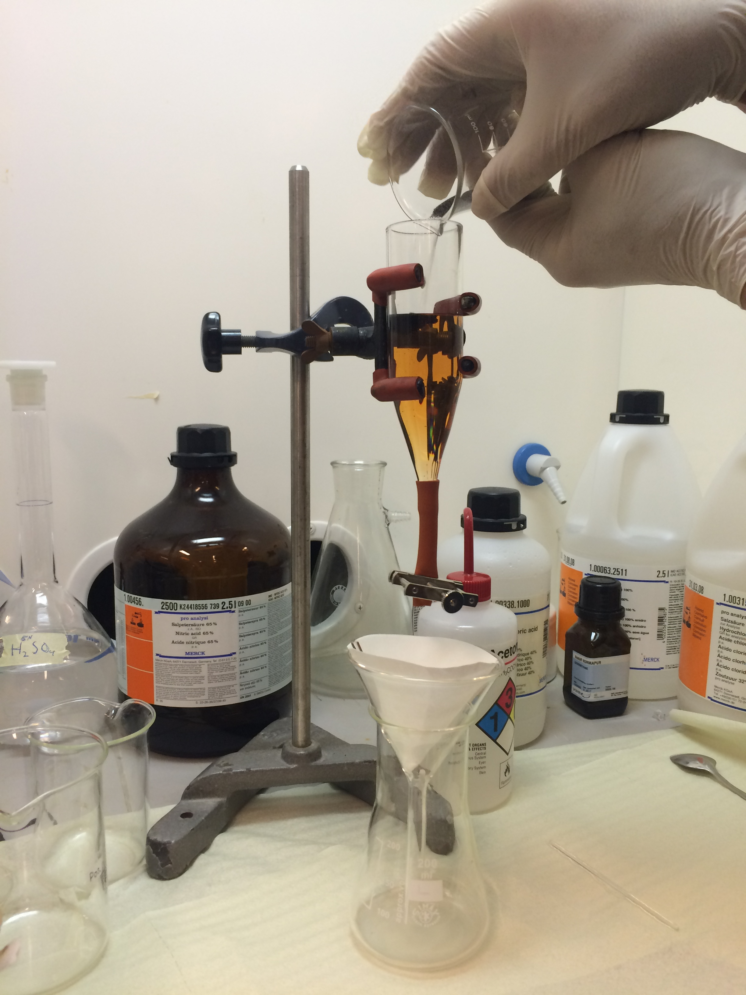 Mineraaliseparointia metyleenijodidilla.